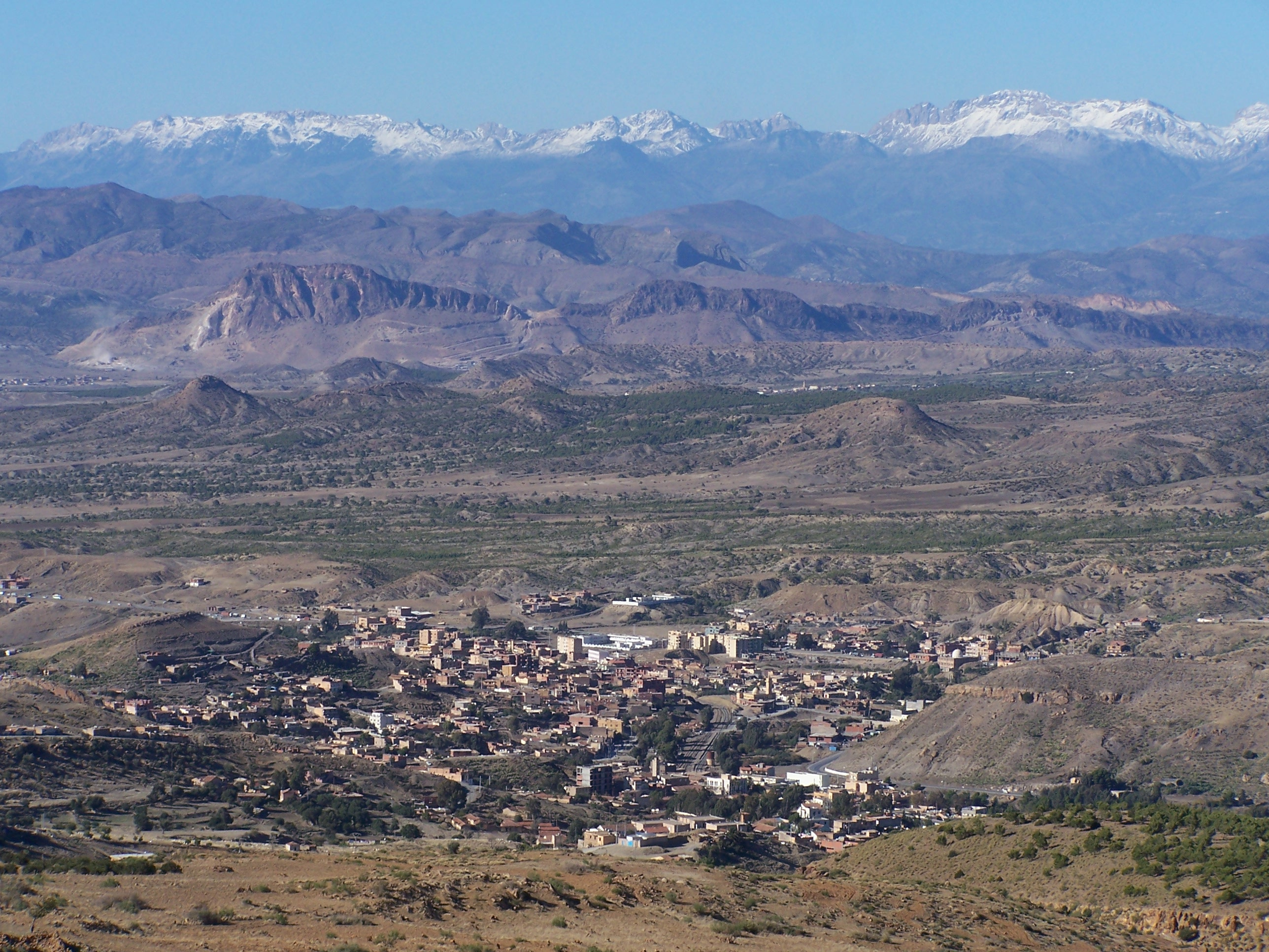 Vue du sud de Mansoura et le sommet enneigée de la chaine de montagne des Bibans